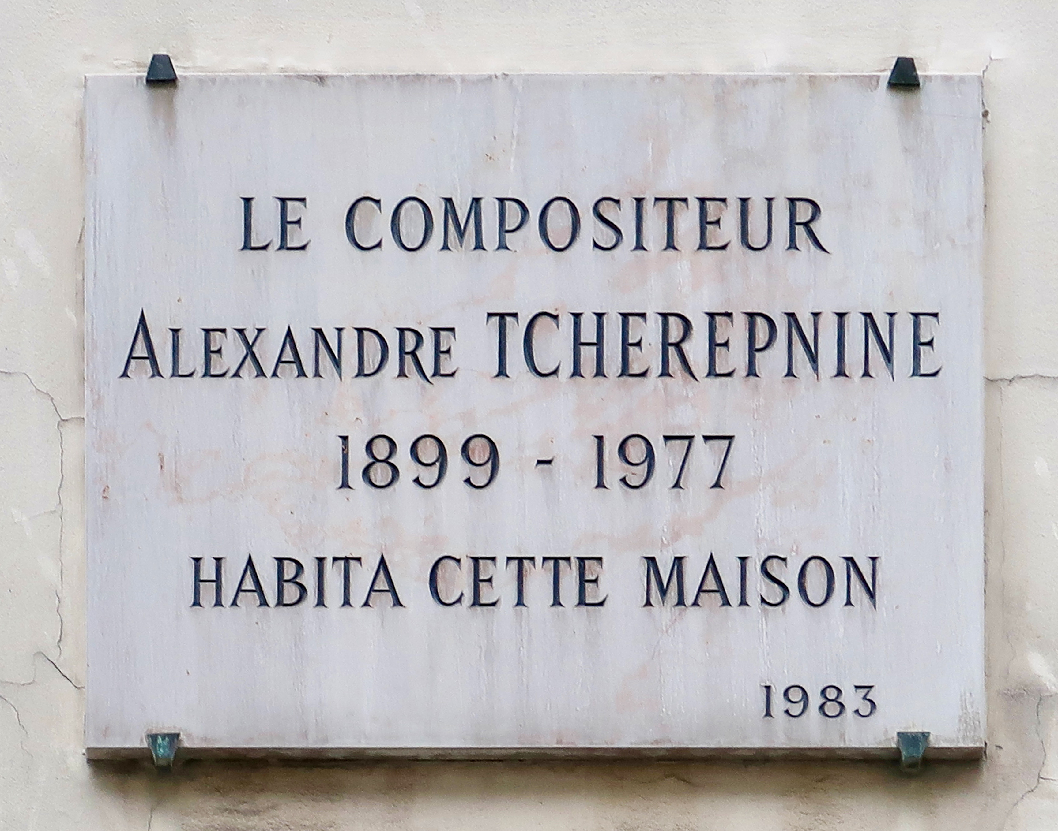 Plaque en hommage à Alexandre Tcherepnine, 2 rue de Furstemberg (Paris, 6e).